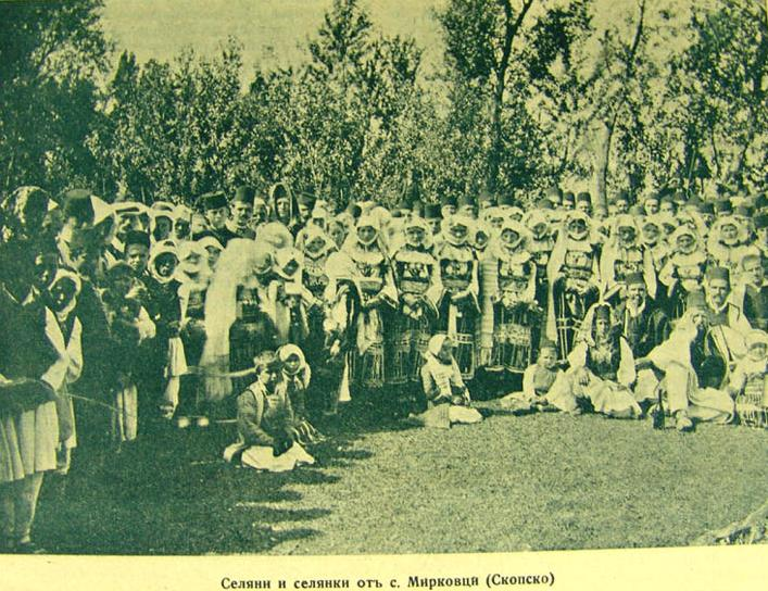 Село Мирковци, скопско